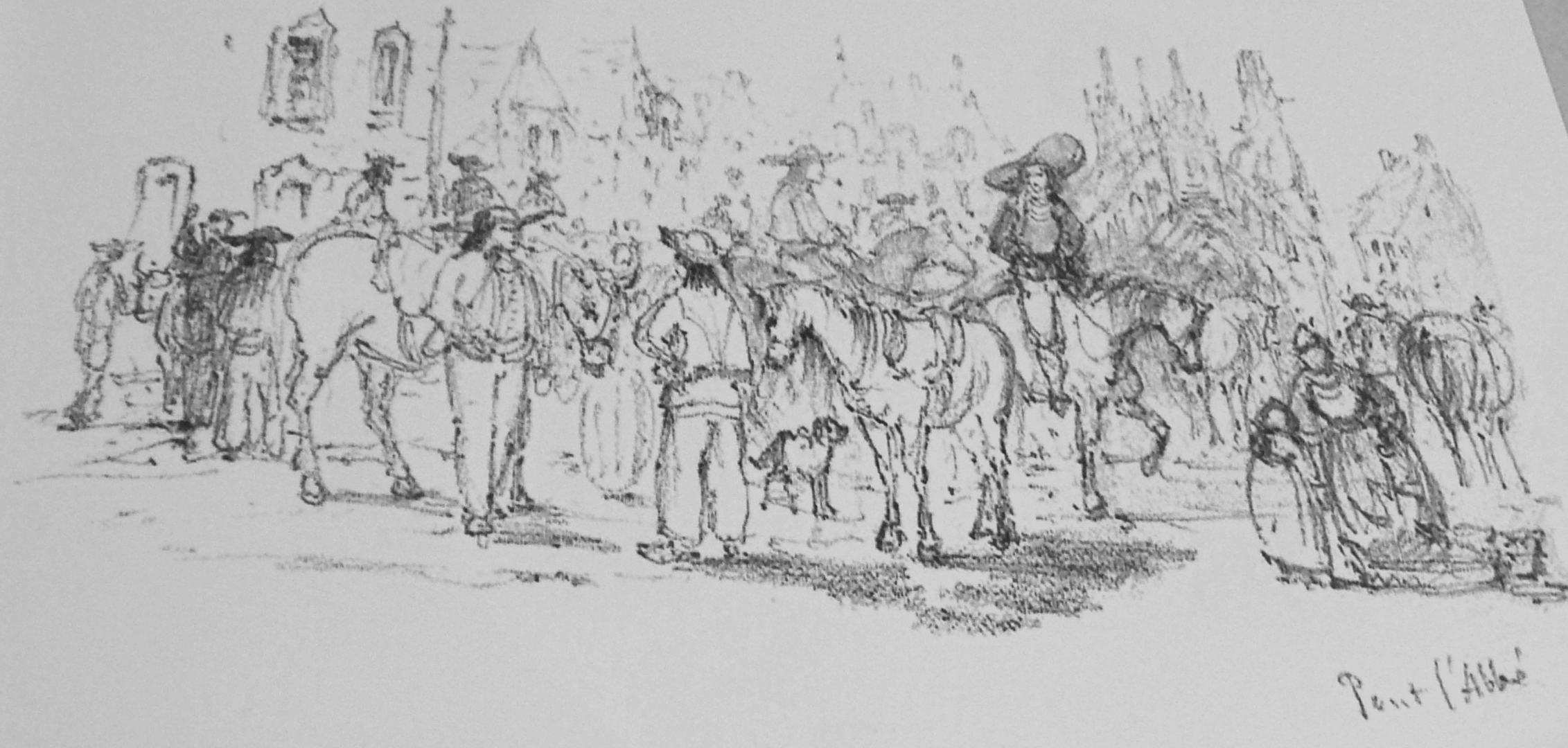 François Louis Fritz de Niederhausen Koechlin : Pont-l'Abbé en 1858